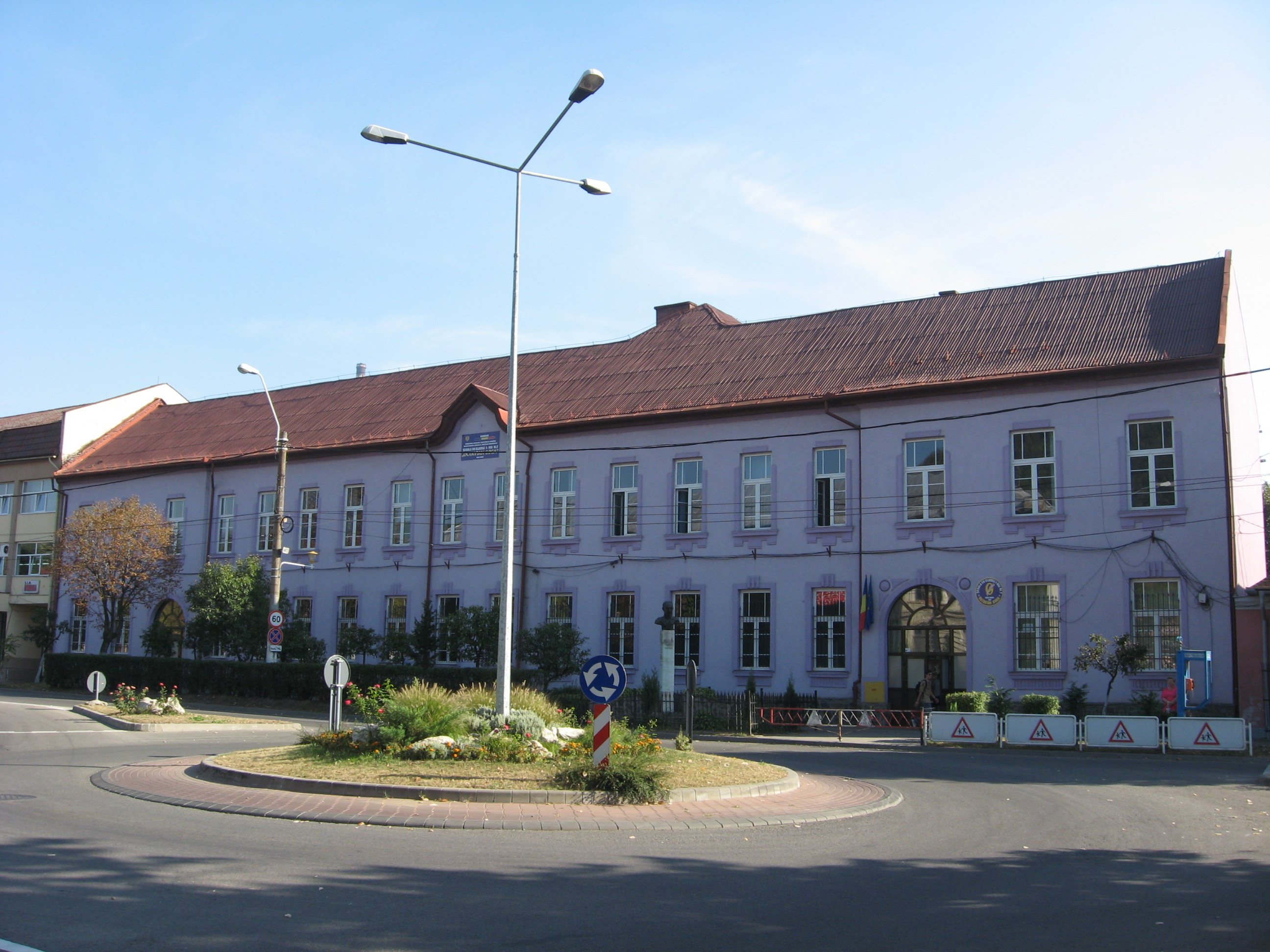 Aceasta e o imagine cu un monument istoric din romania clasificat cu numarul MM-II-m-B-04470